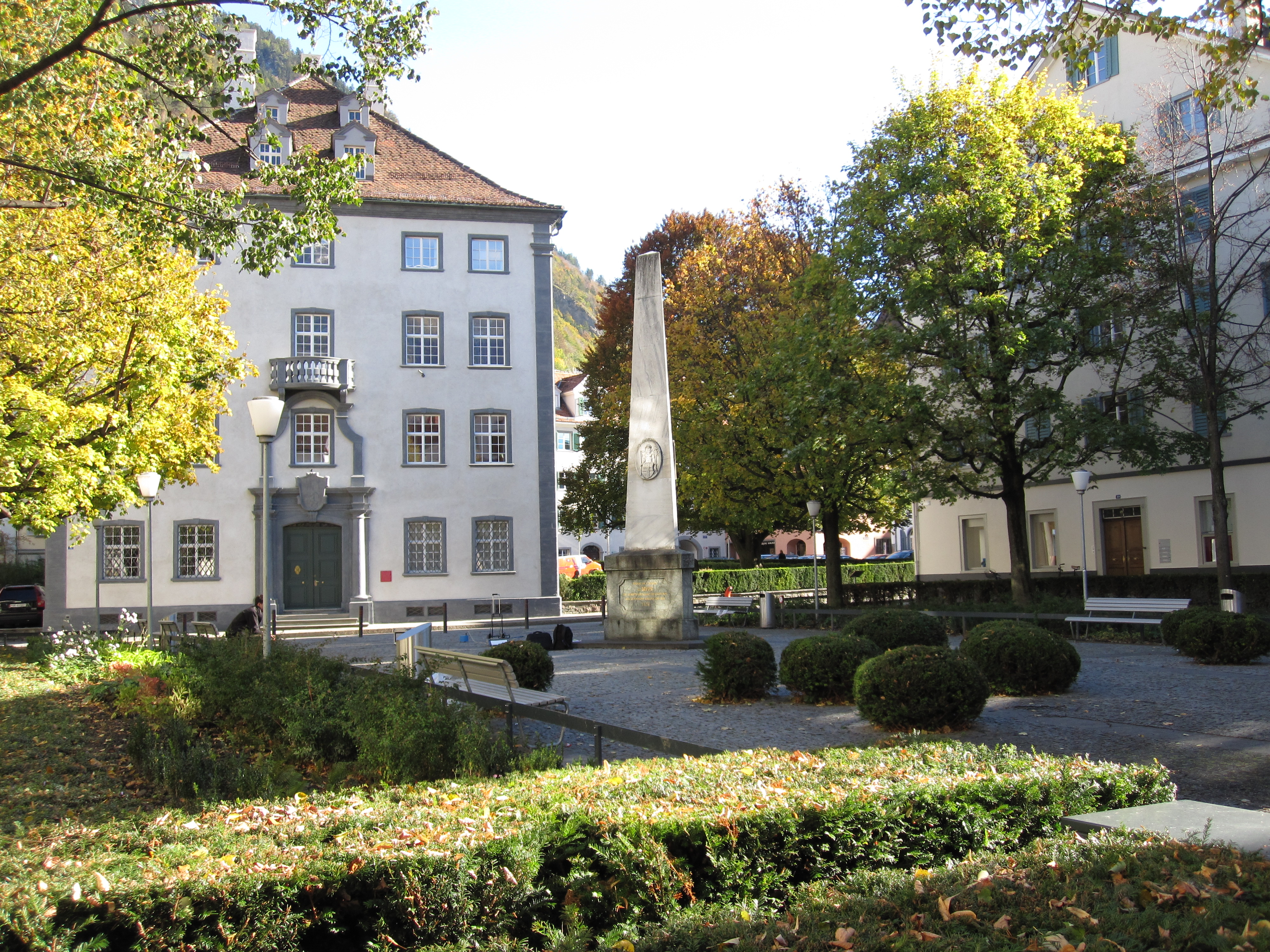 Regierungsplatz mit Vazerol-Denkmal in Chur (Kanton Graubünden)